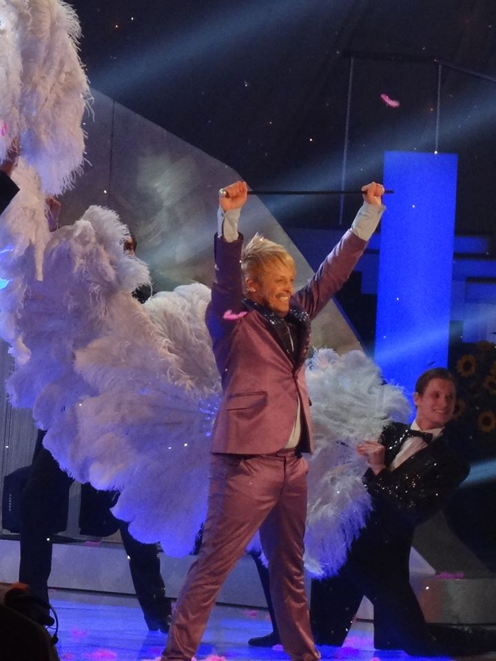 Ross Antony während seines Auftritts bei "Das Sommerfest in Österreich" in Graz